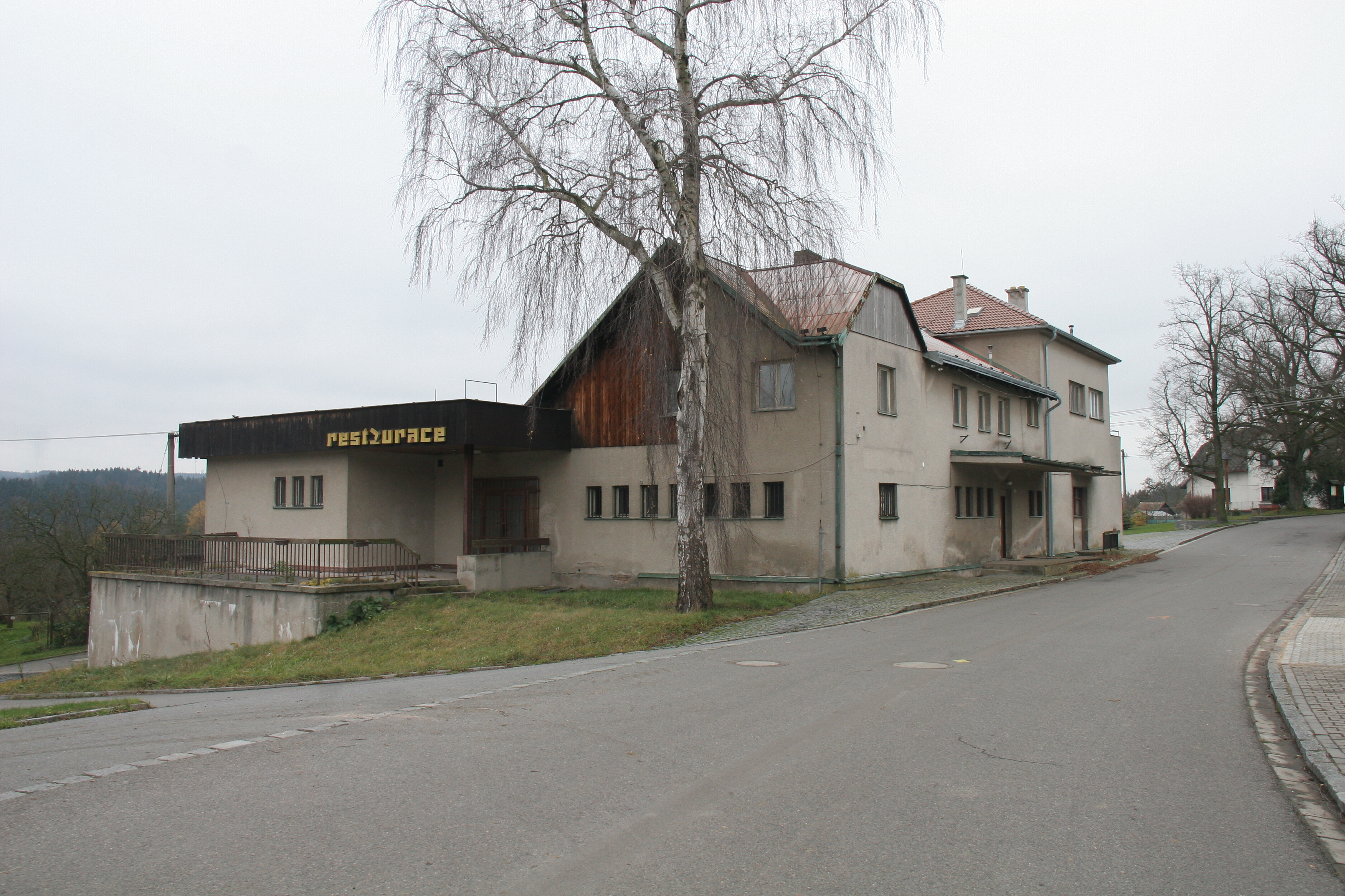 Křižanovice bývalá hospoda